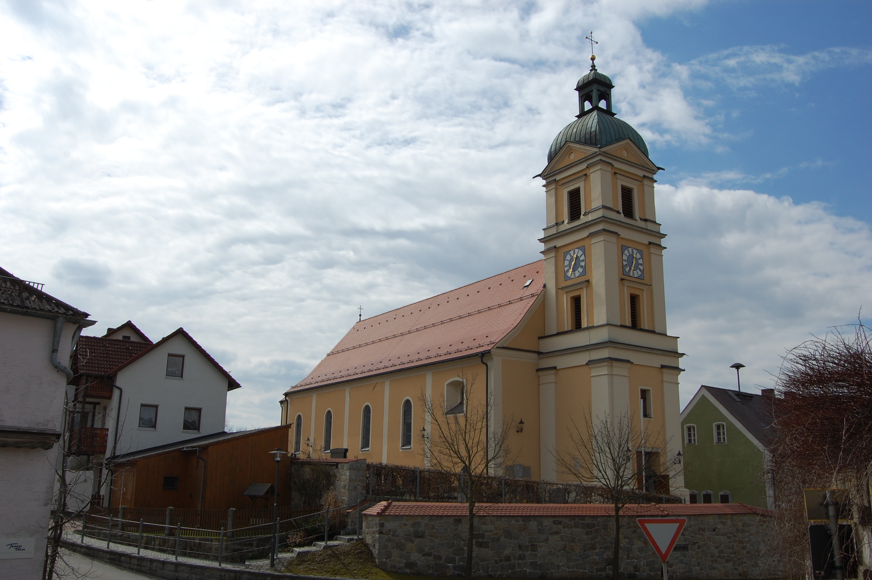 Pfarrkirche St. Lambert in Teunz, Landkreis Schwandorf (2010)